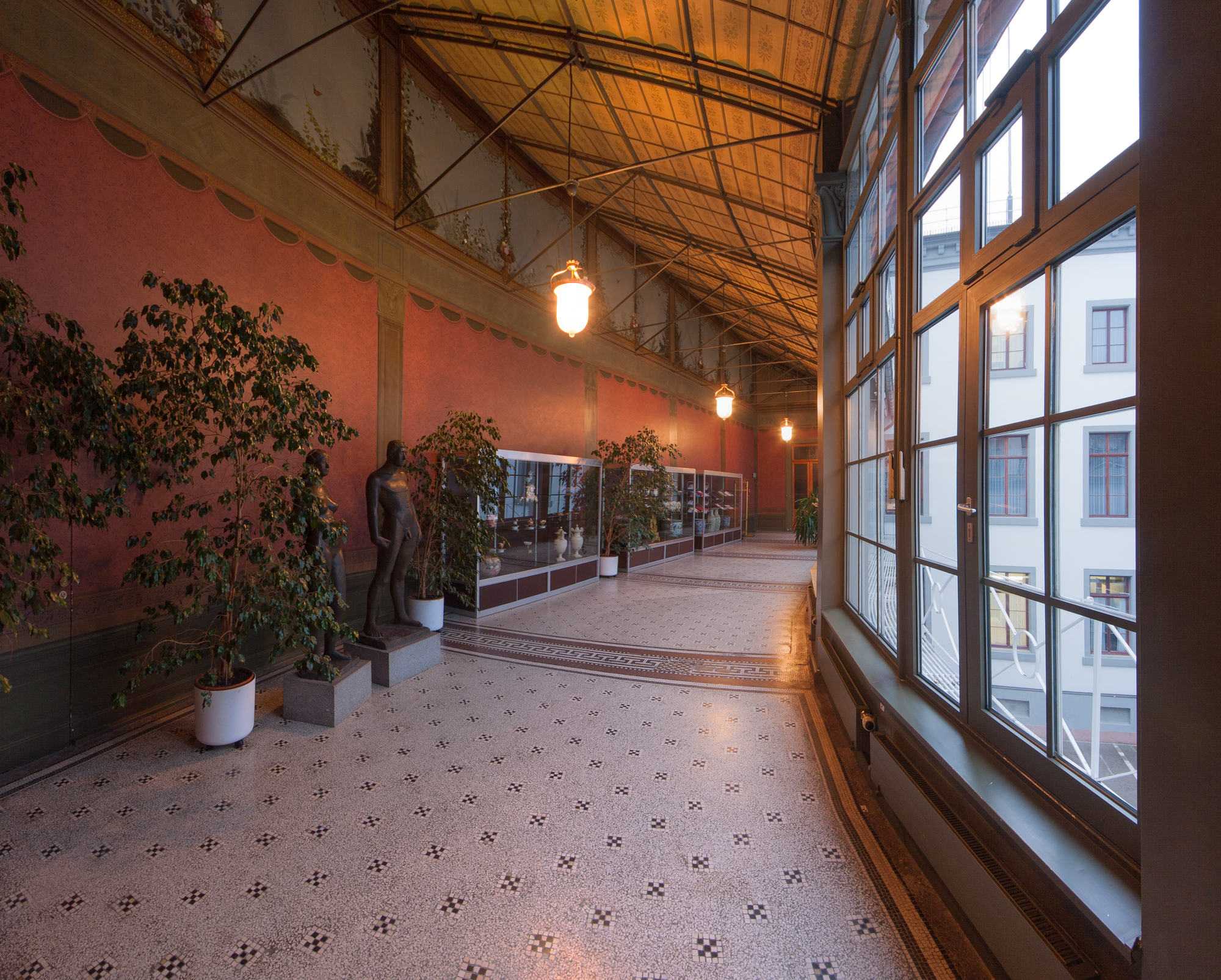 Wintergarten des Stadtschlosses Wiesbaden